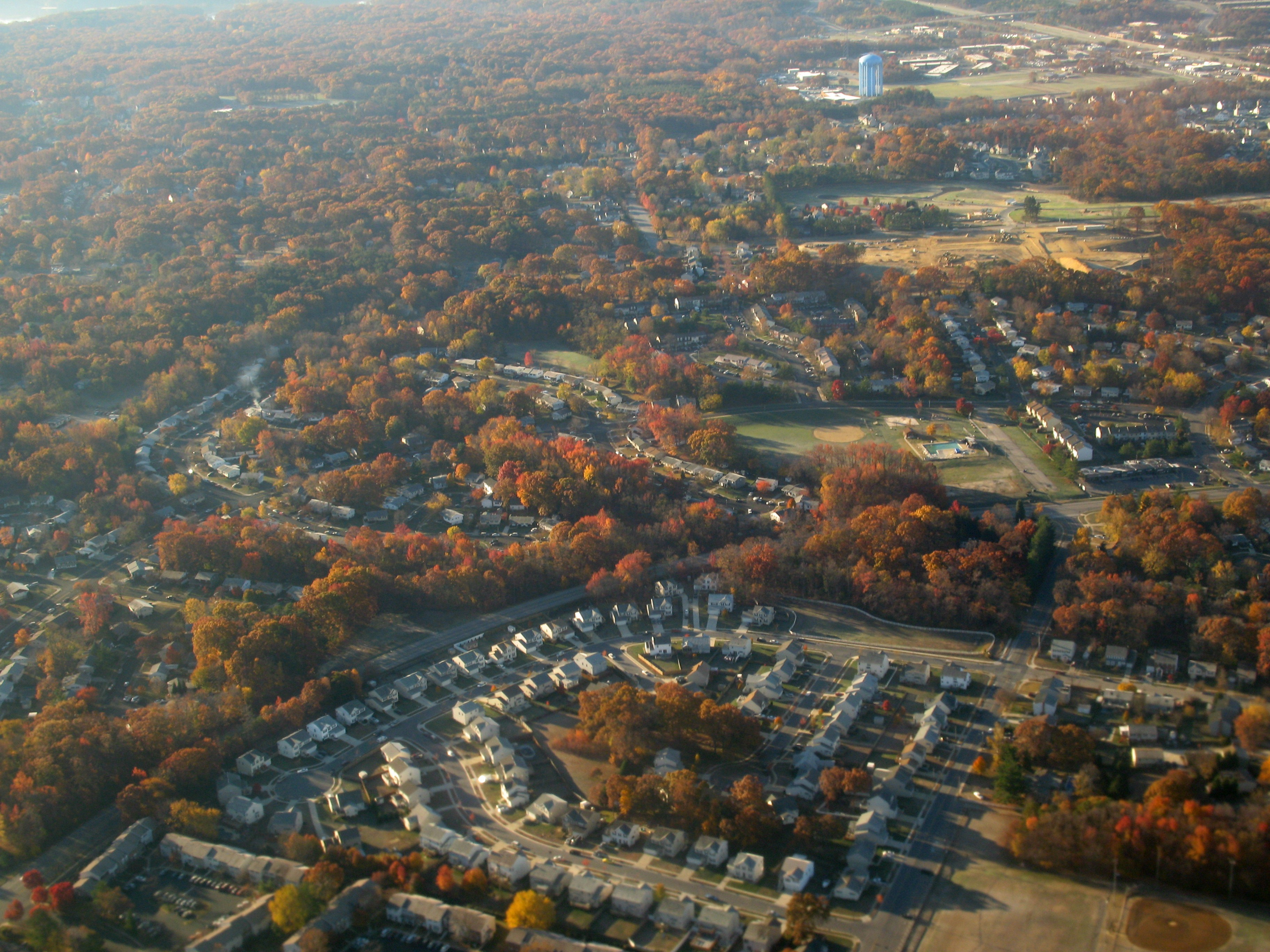 2007 11 24 - 229 - Millersville - Old Mill Blvd